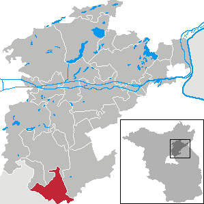 Ahrensfelde in Brandenburg (Country) - District Barnim